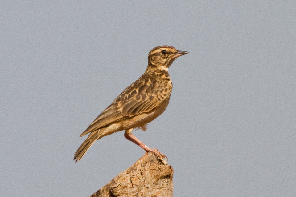 Ngaundere Ranch